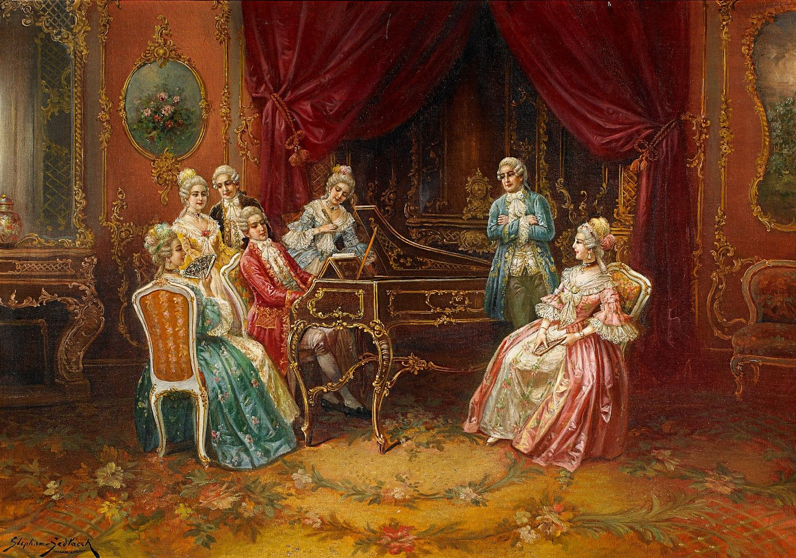 Der junge Mozart am Spinett.title QS:P1476,de:"Der junge Mozart am Spinett." label QS:Lde,"Der junge Mozart am Spinett."